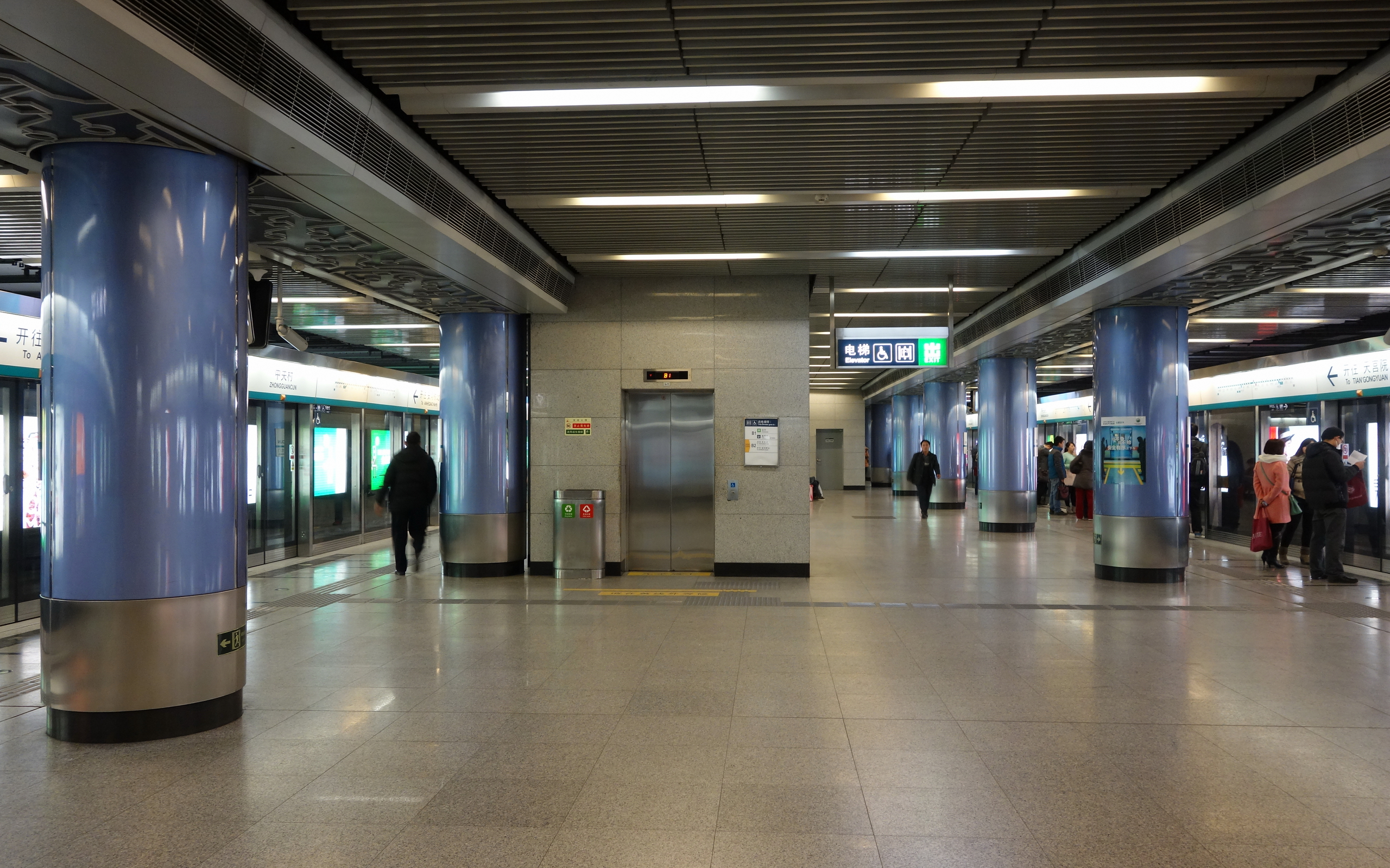 北京地铁4号线中关村站岛式站台